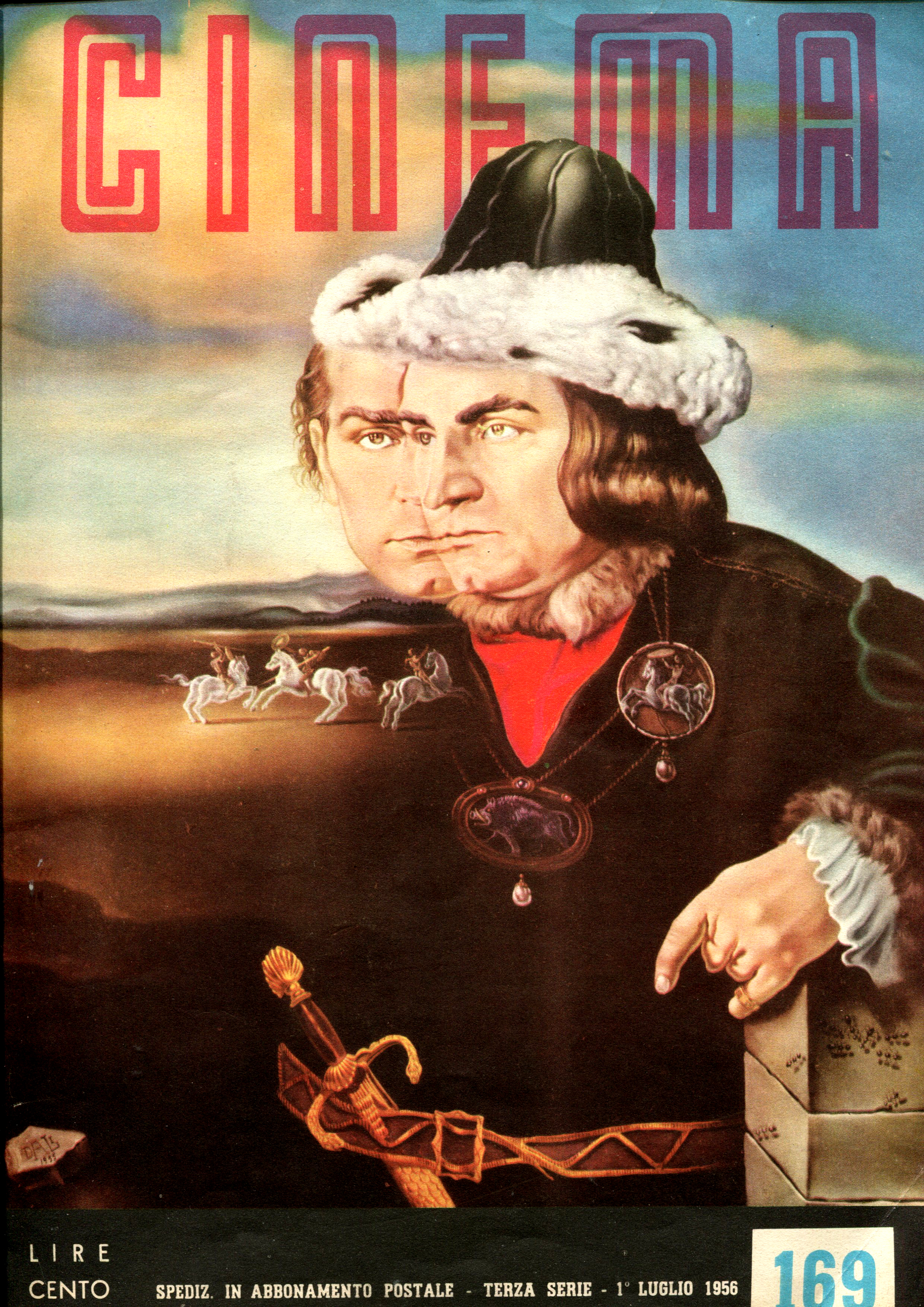 Copertina dell'ultimo numero (169) uscito il 1 luglio 1956 del quindicinale Cinema. In copertina immagini dal film Giovanni dalle Bande Nere, film italiano del 1956, regia di Sergio Grieco